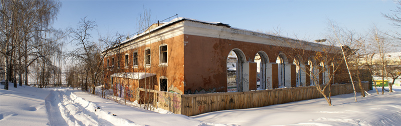 Руины бассейна «Чайка» в Самаре